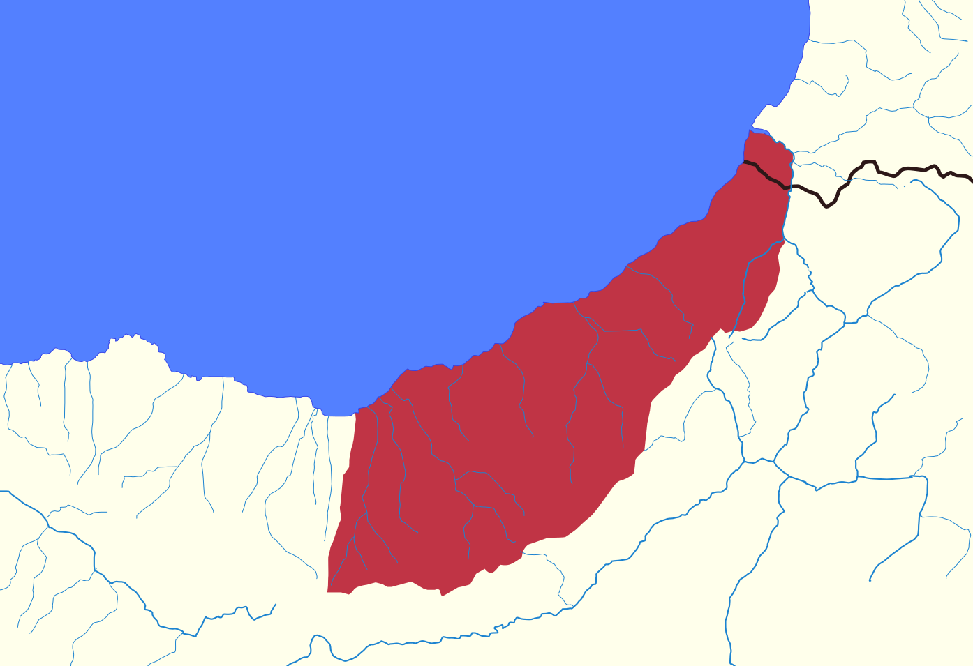 ლაზისტანის რუკა